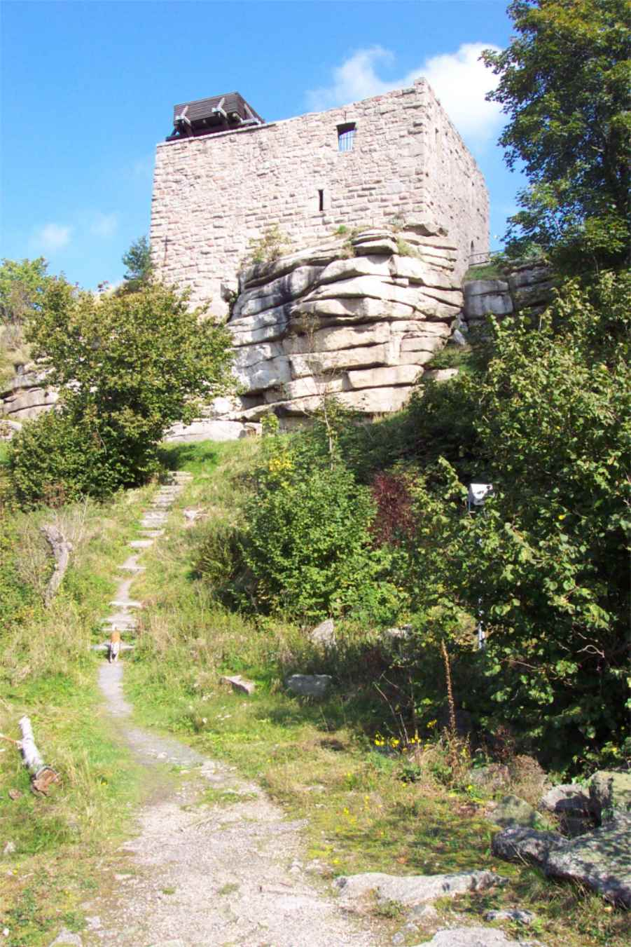 Burgruine Epprechtstein bei Kirchenlamitz (Bayern, Landkreis Wunsiedel)